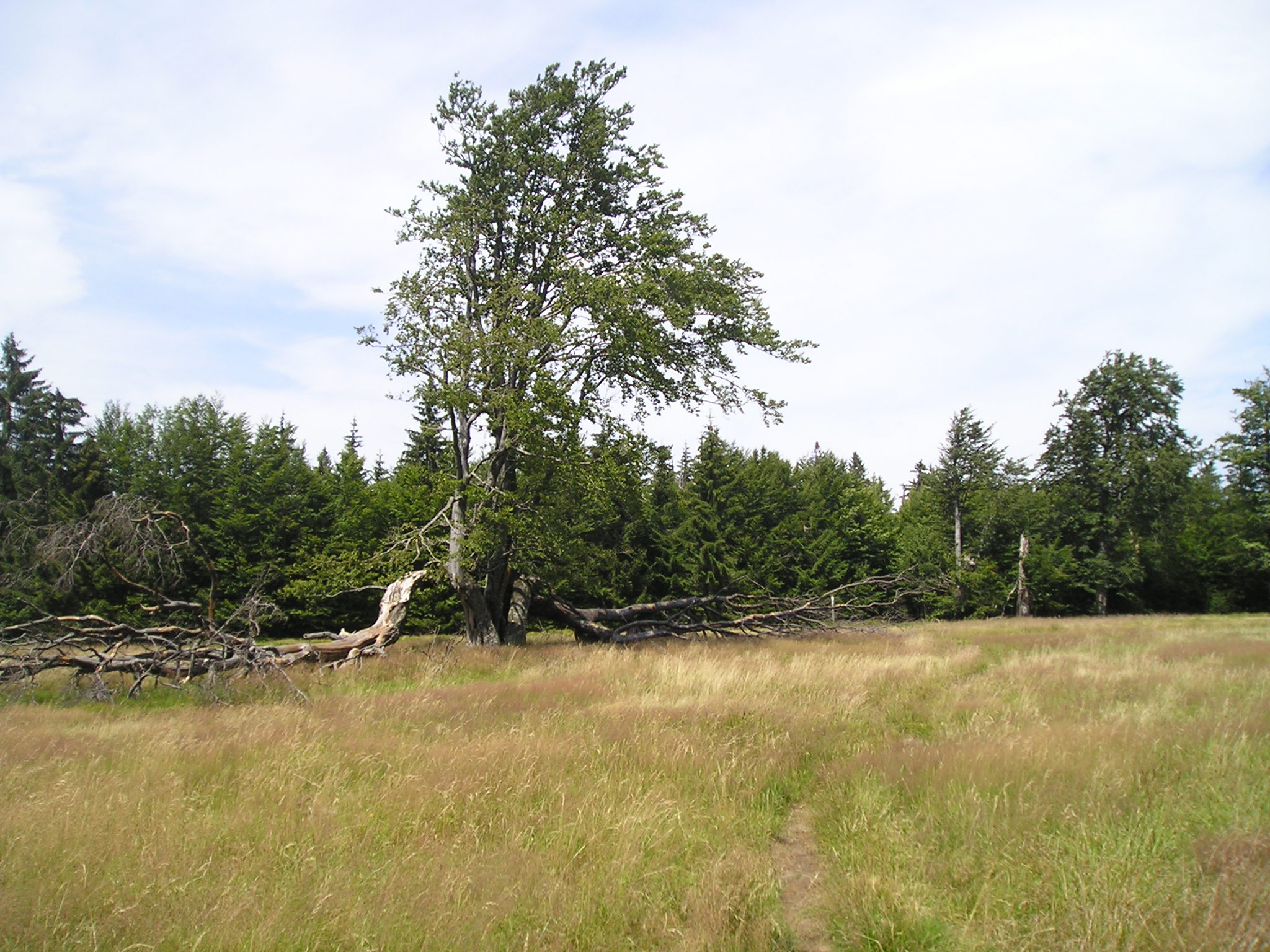 nature